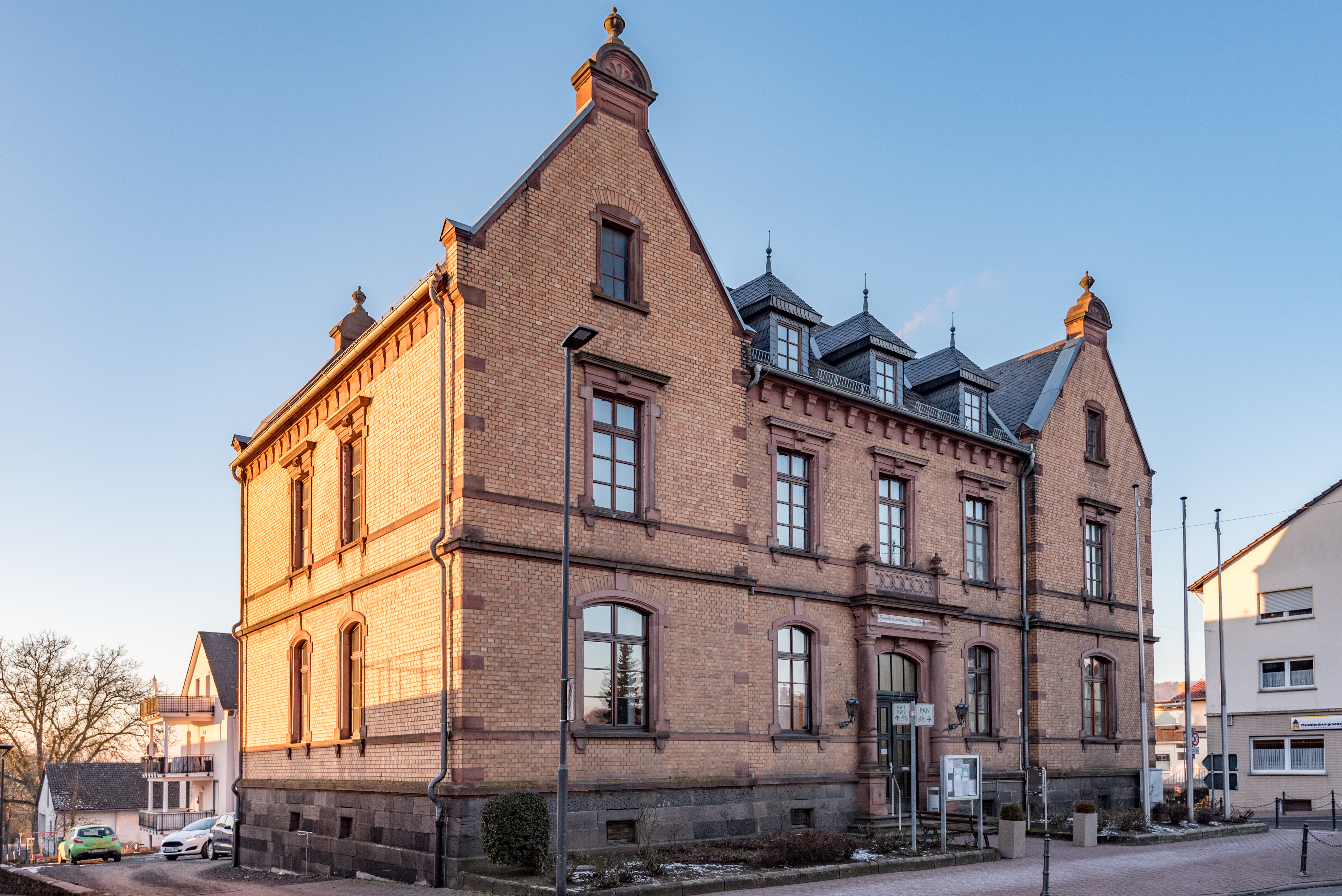 Homberg (Ohm), Frankfurter Straße 1